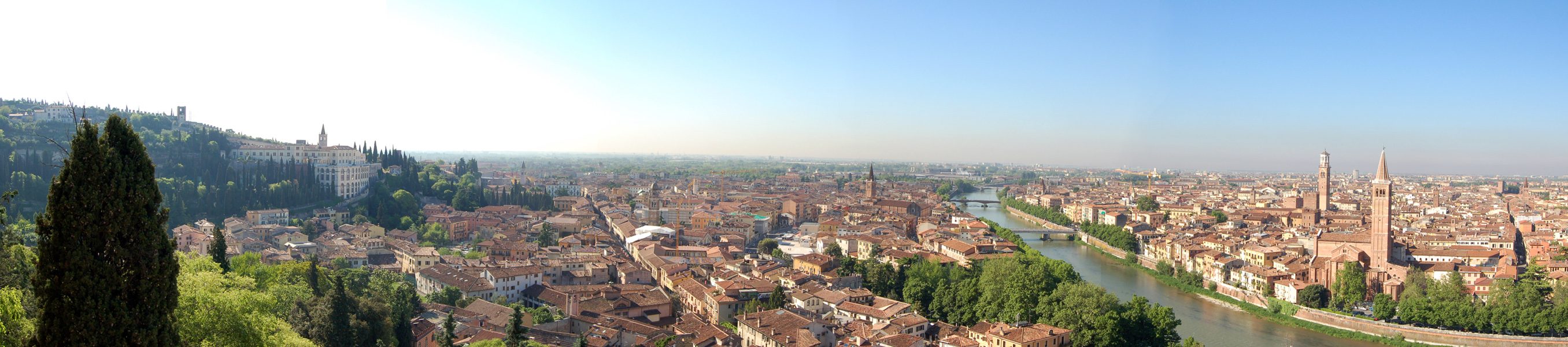 Panorama di Verona, che inizia dalle colline ad est, via Veronetta, fino alla chiesa di Sant'Anastasia